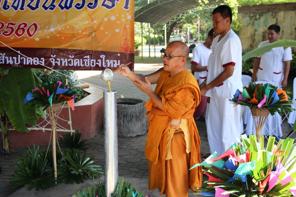 หล่อเทียน 60 3